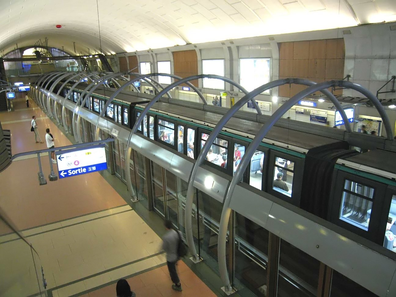 Metro de Paris Ligne 14 station Chatelet Lieu : Paris, France Date : Juin 2006 Auteur : Pline photo personnelle